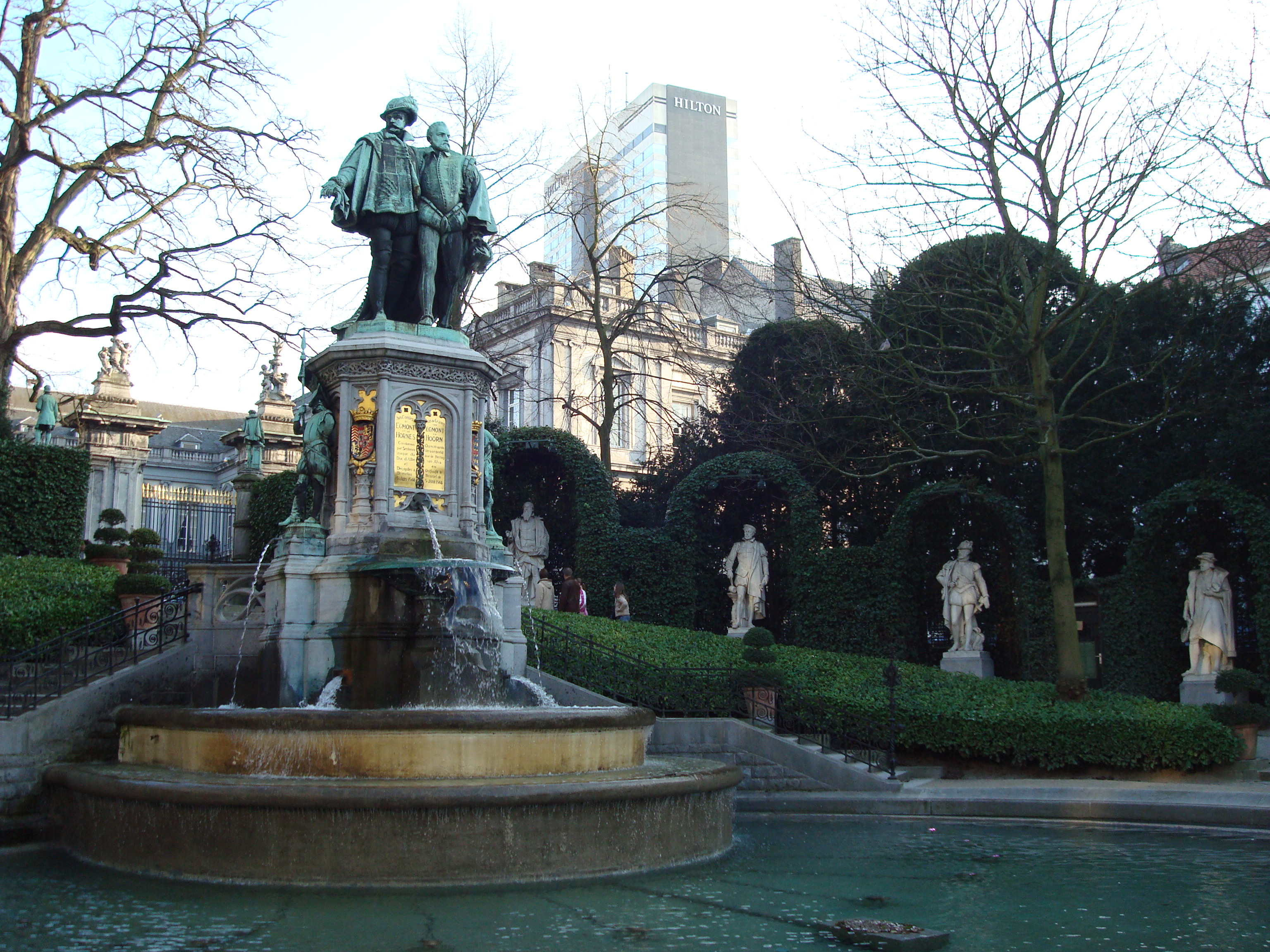 Petit Sablon Park in Brussels